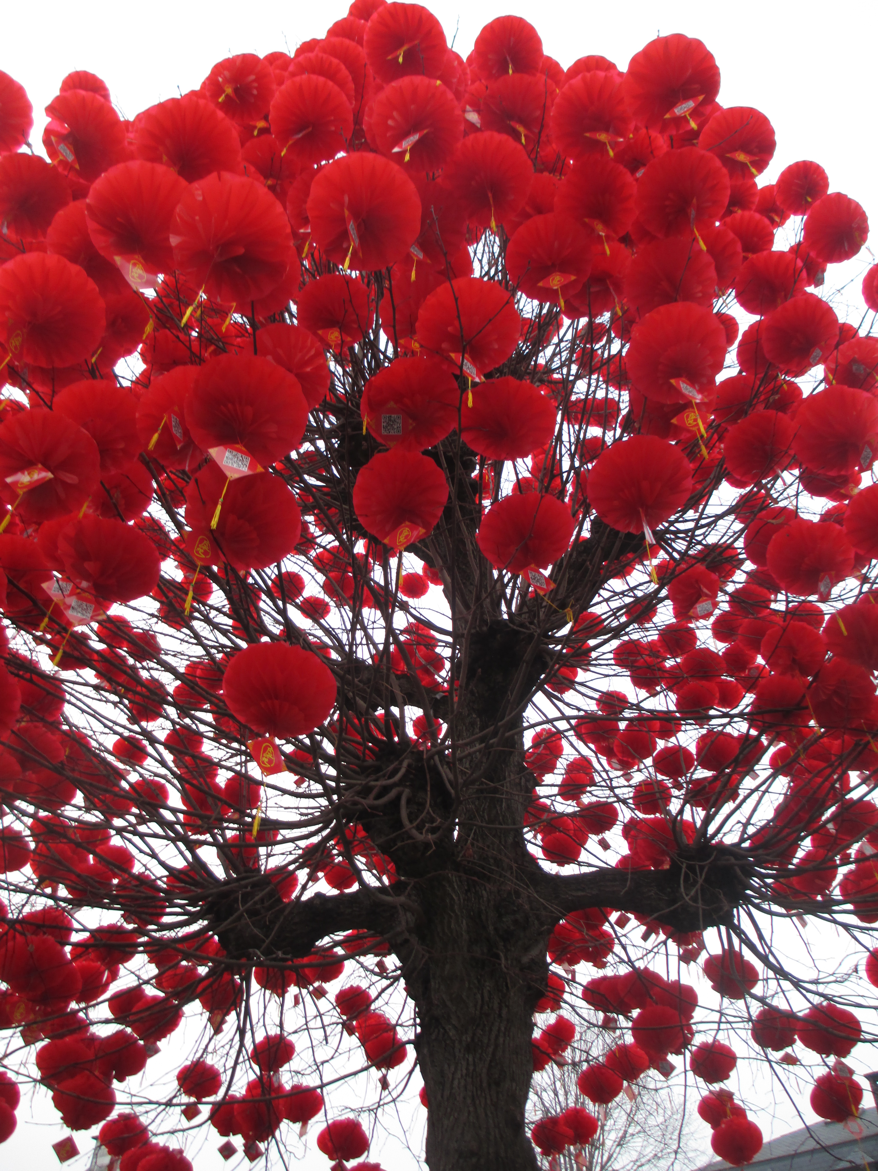 Lors de la Biennale d'Art Theux / Chine en janvier 2015, la population theutoise était invitée à décorer maisons, fenêtres, jardins, rues, parcs et lieux publics avec des milliers de lanternes offertes par un artiste chinois. Voici l'une des installations artistiques, l'arbre de la Place Pascal Taskin face au Centre Culturel de Theux.